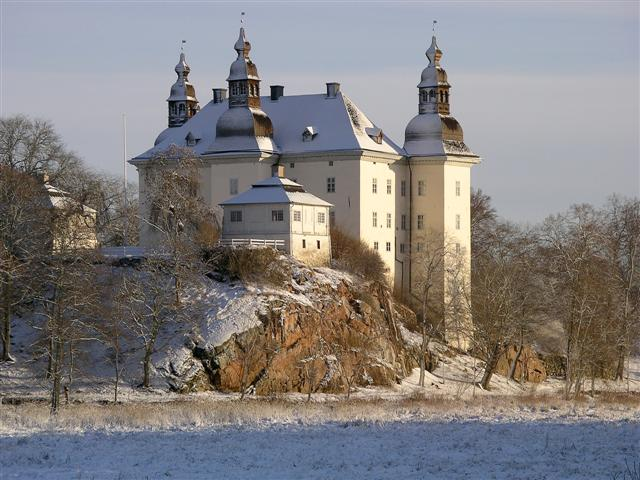 Ekenäs slott Foto: Tor Svensson